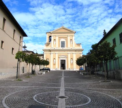 Saint Valentine's basilica